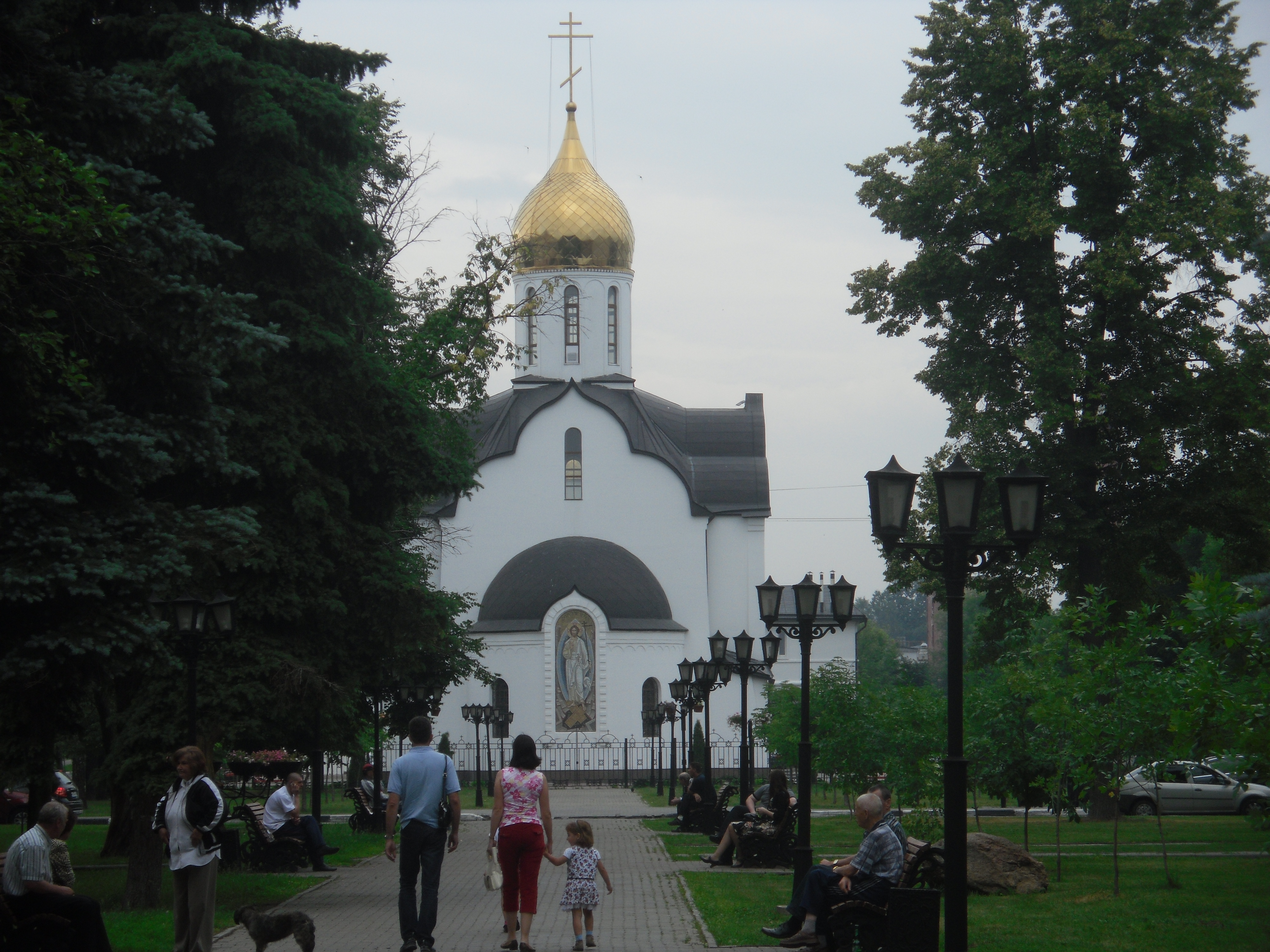 Вид на храм Александра Невского в Балашихе со стороны проспректа Ленина